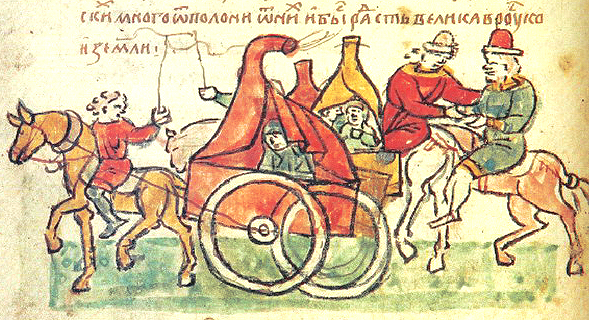 Половецькі вежі (мініатюра з Радзивілівського літопису)